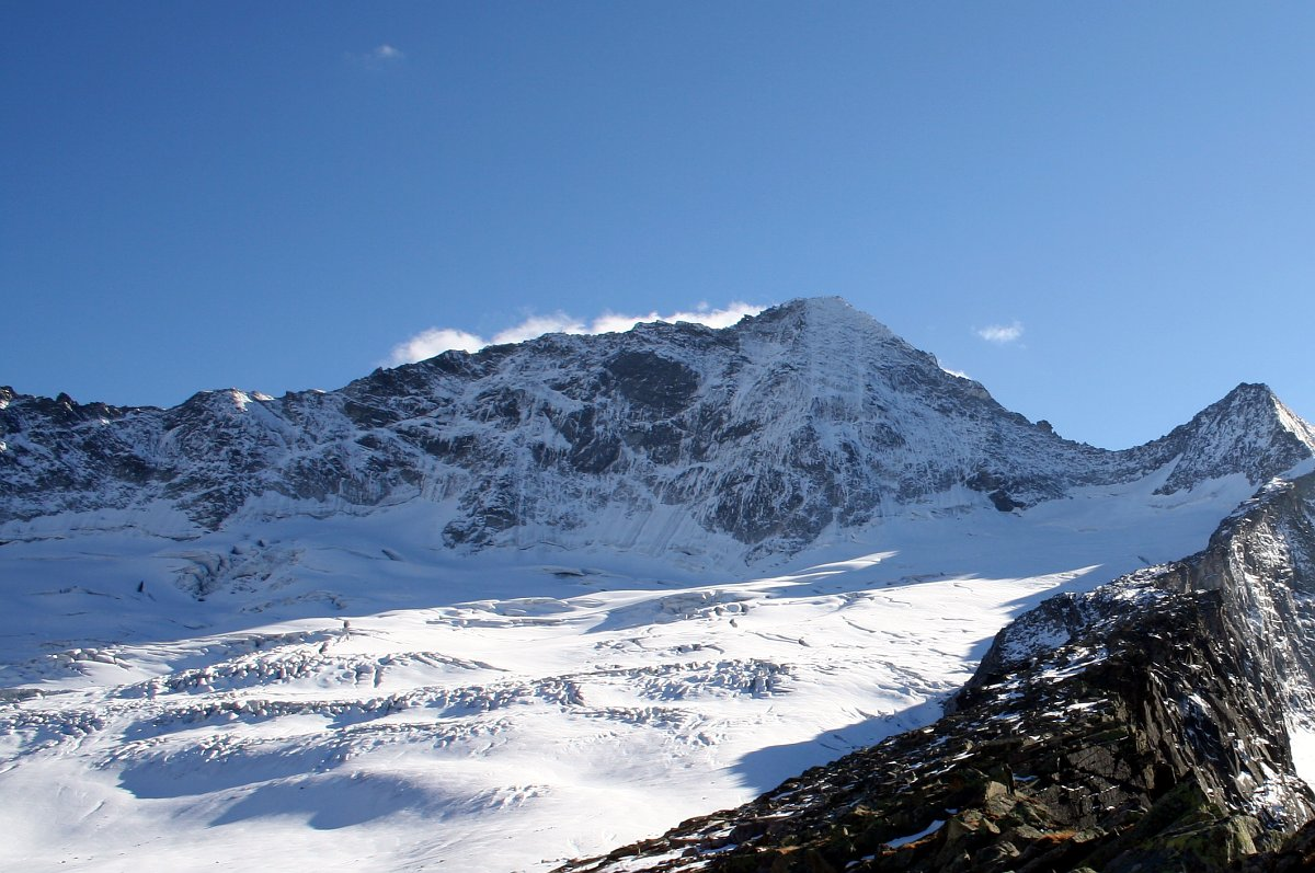 Der Turnerkamp in den Zillertaler Alpen, Österreich, vom Rossrückengrat aus gesehen.